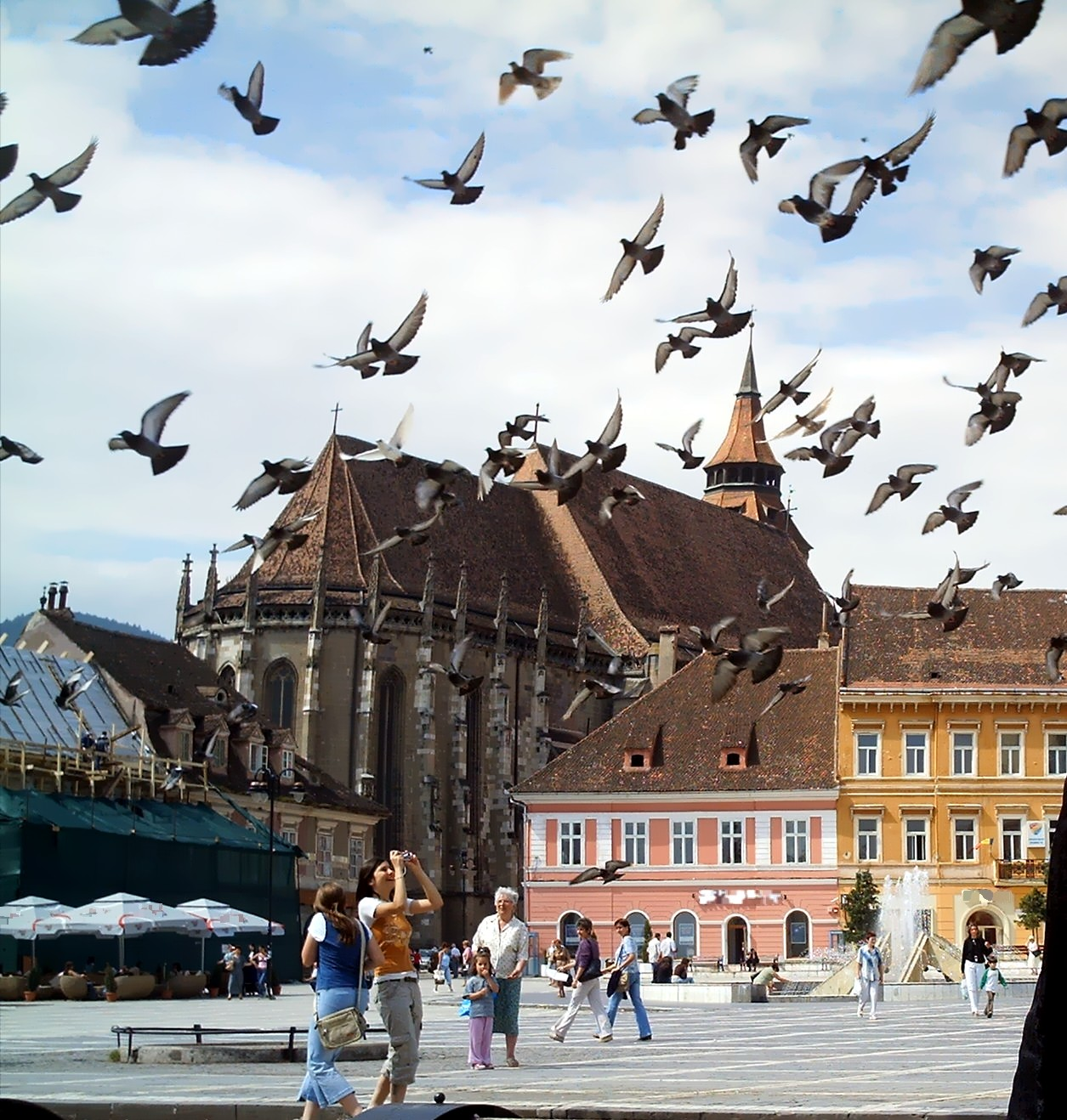 Die Schwarze Kirche in Braşov (Kronstadt), Rumänien